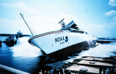 Querstapellauf